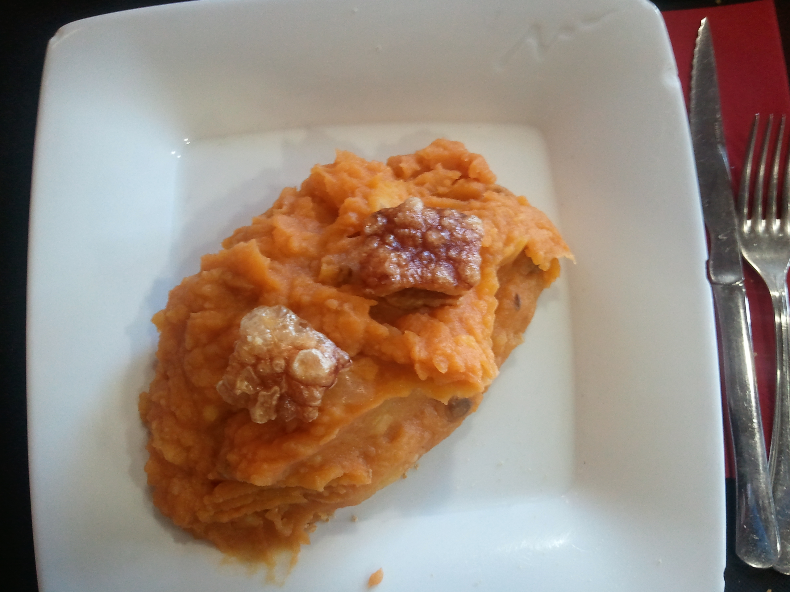 Patatas revolconas, provincia de Ávila, España.